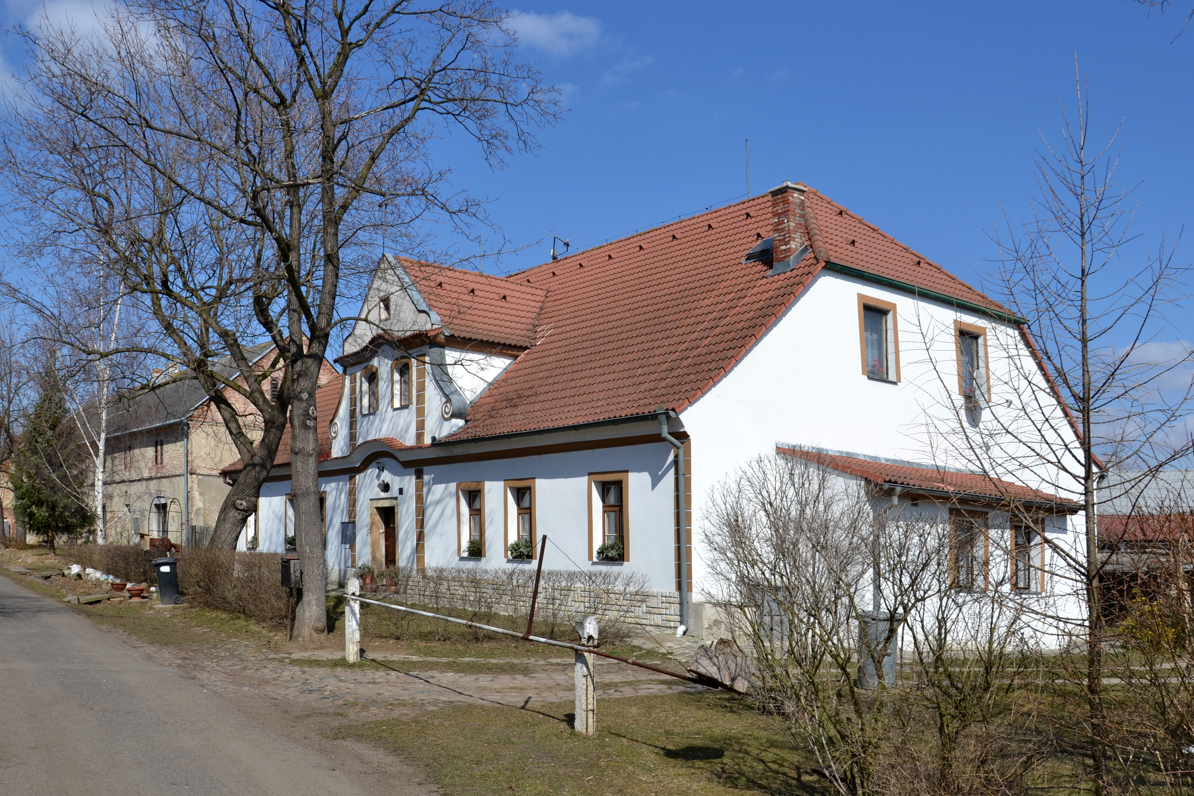 Venkovská usedlost (Vičice), Vičice 6